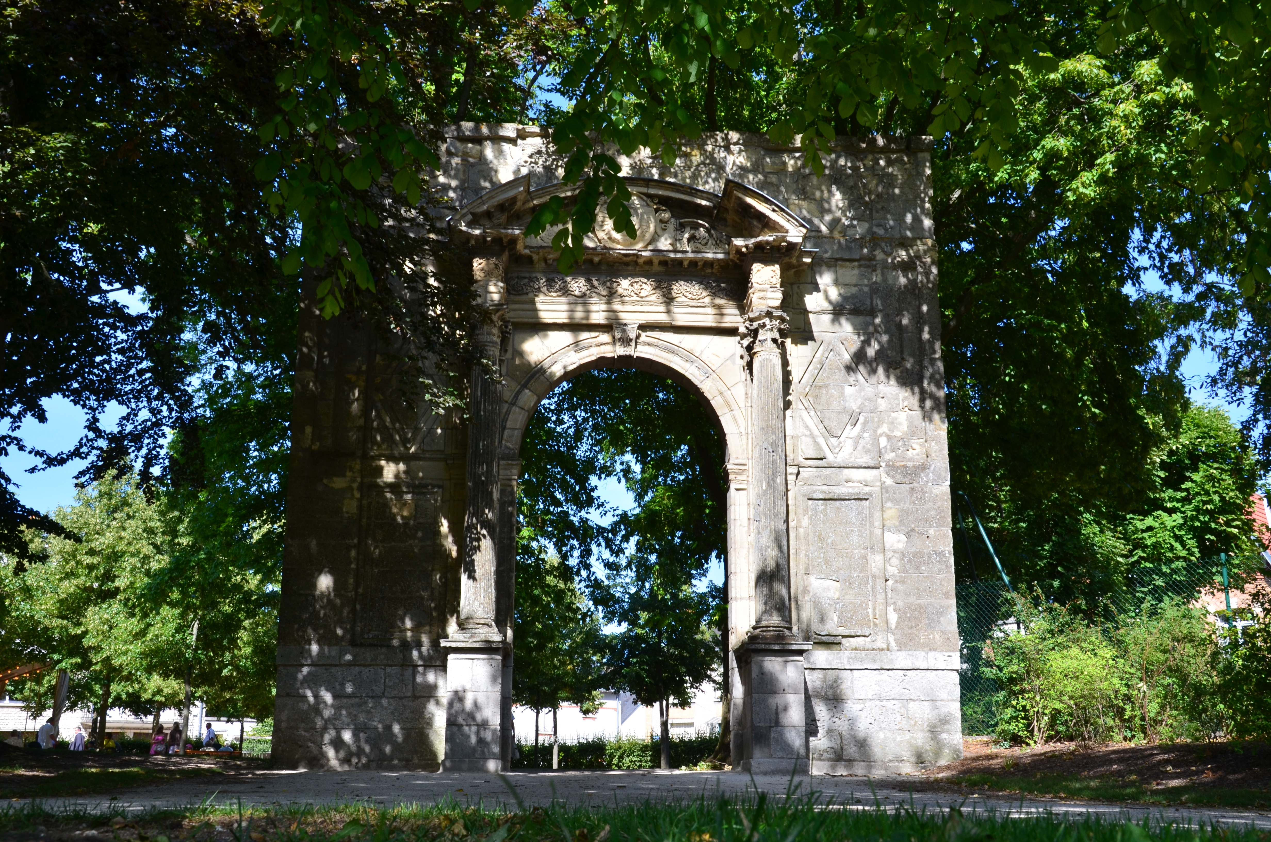 Arc de triomphe dans le parc Pasteur d'Orléans.